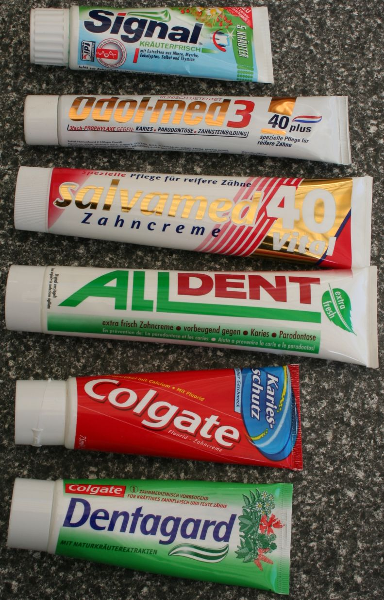 Zahncremetuben verschiedener Hersteller